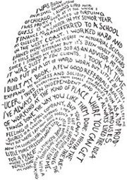 Fingerprint in art